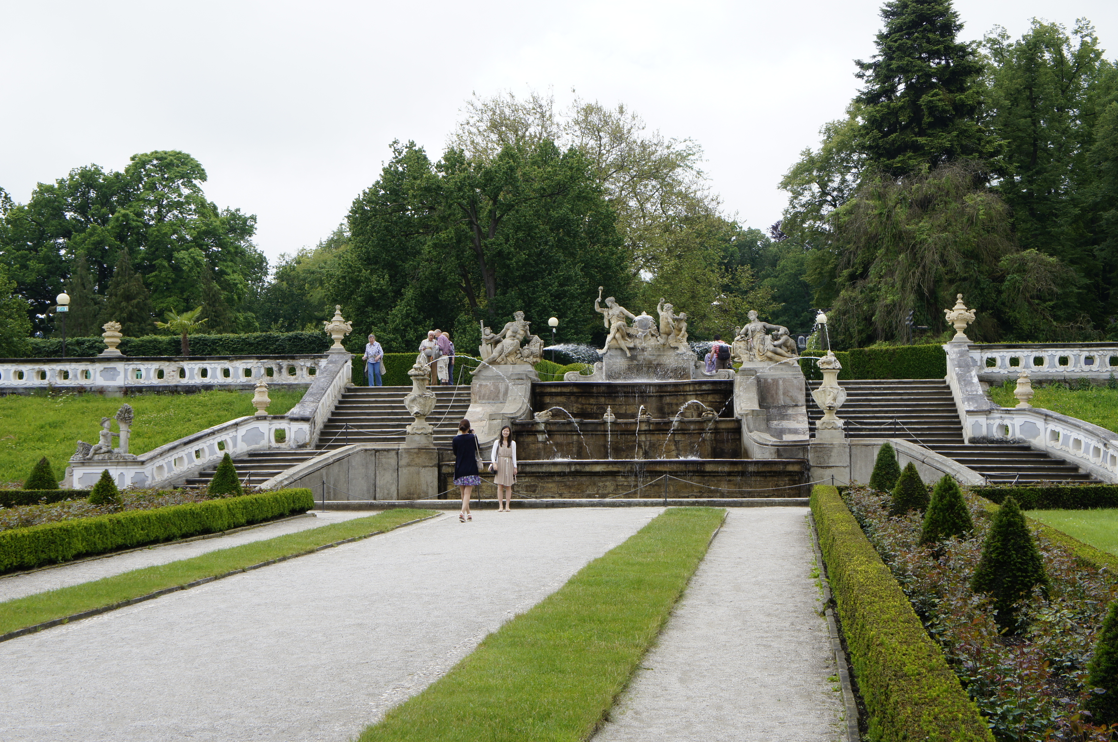 Zahrada - dolní panská (Český Krumlov), Český Krumlov